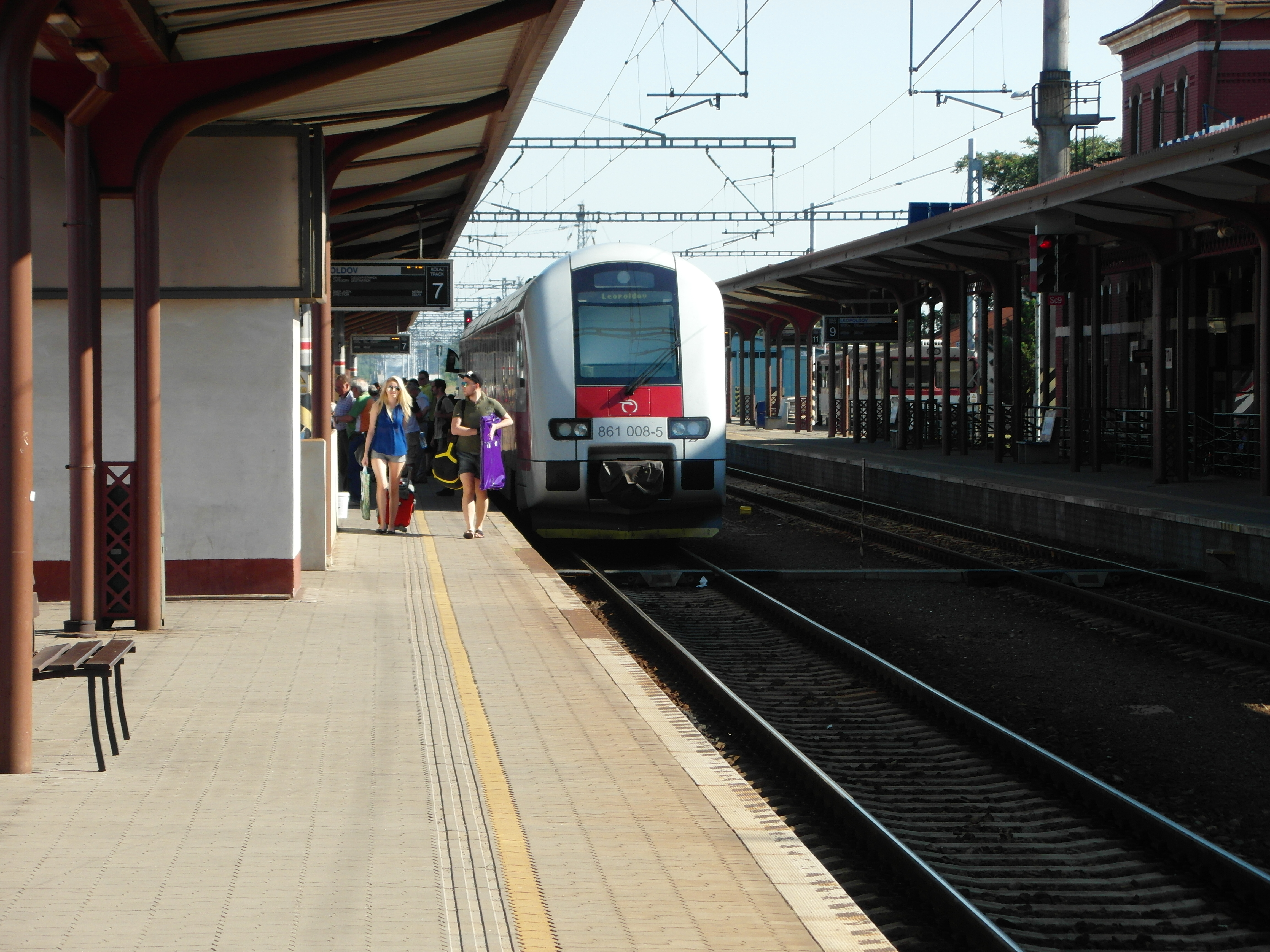 DMJ 861 ZSSK v stanici Leopoldov